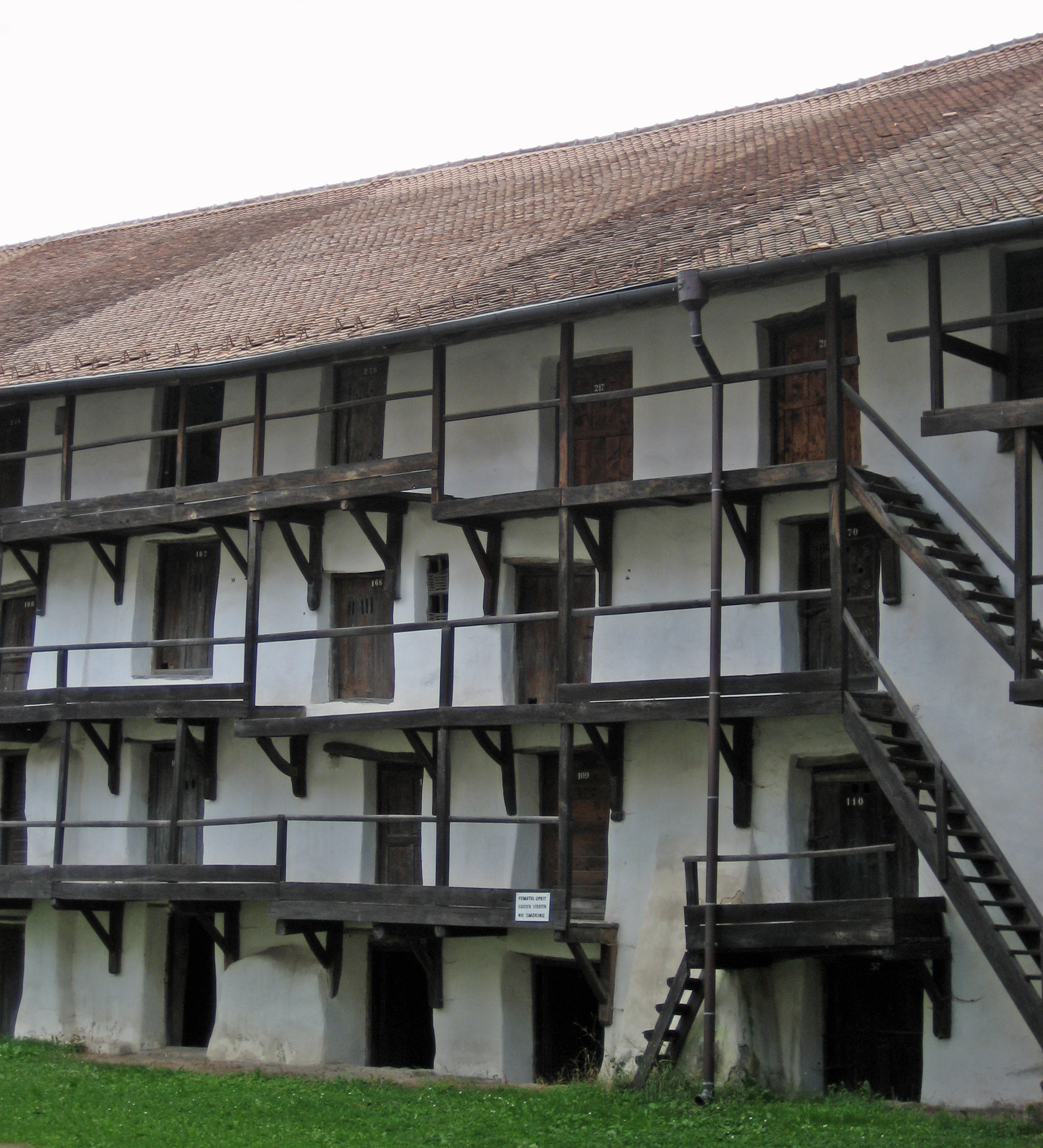 Prejmer (Tartlau), Romania